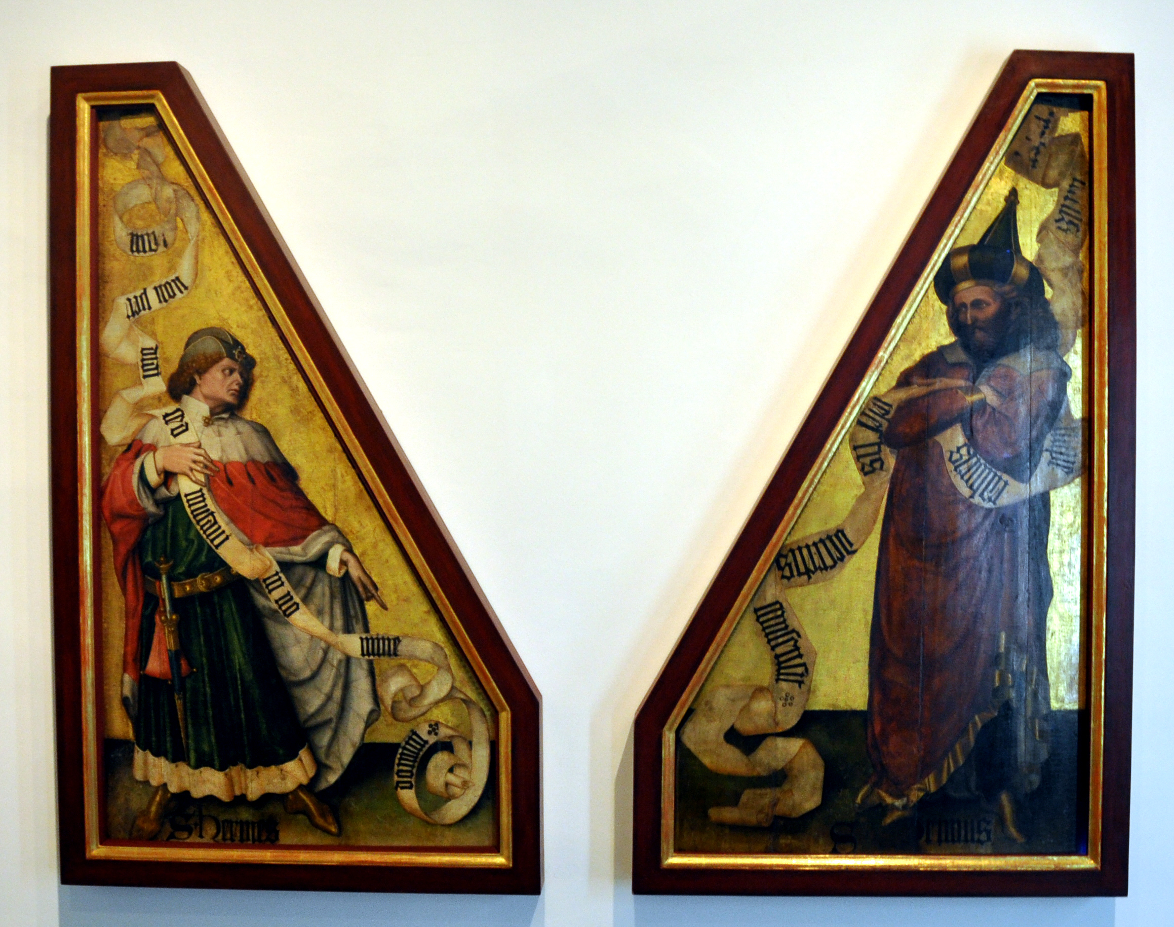 wohl aus dem Lungau